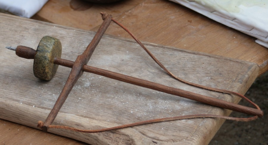 Eine Dreule, wie sie in der Wikingerzeit verwendet wurde.